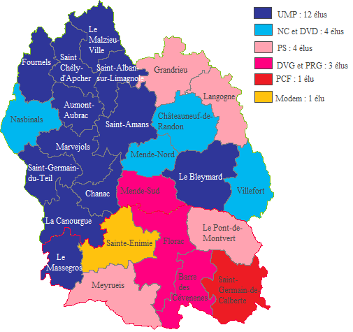 Étiquettes politiques des conseillers généraux de la Lozère suite aux cantonales de 2008